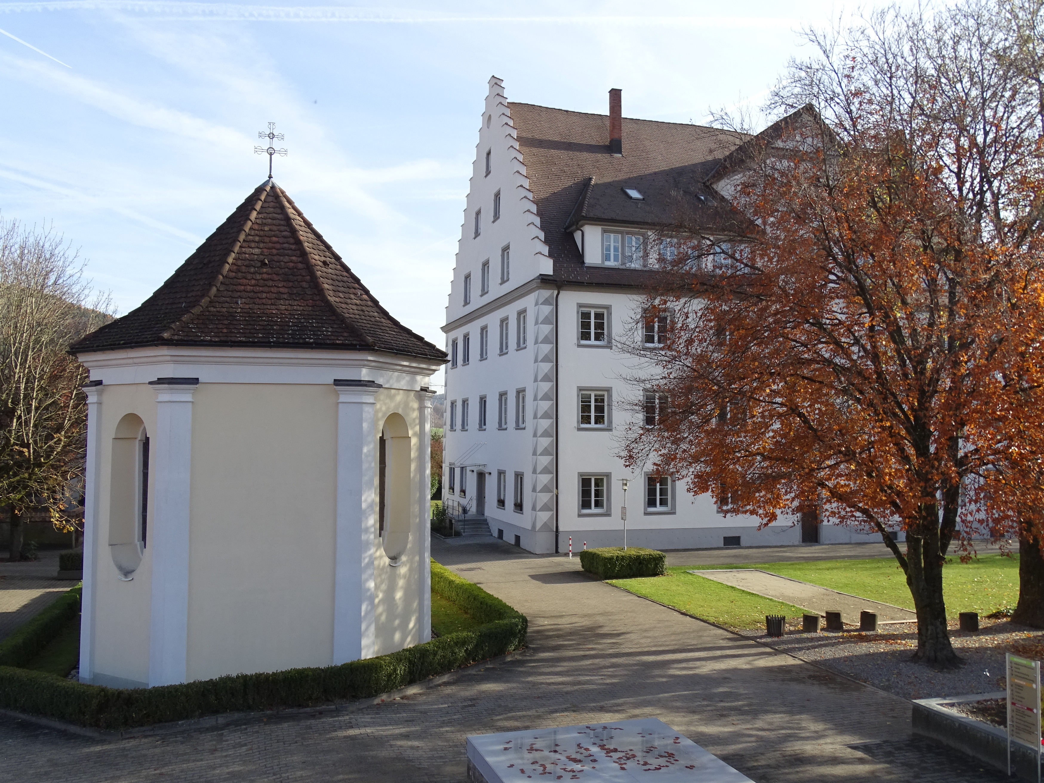 Schloss und Kapelle Gurtweil